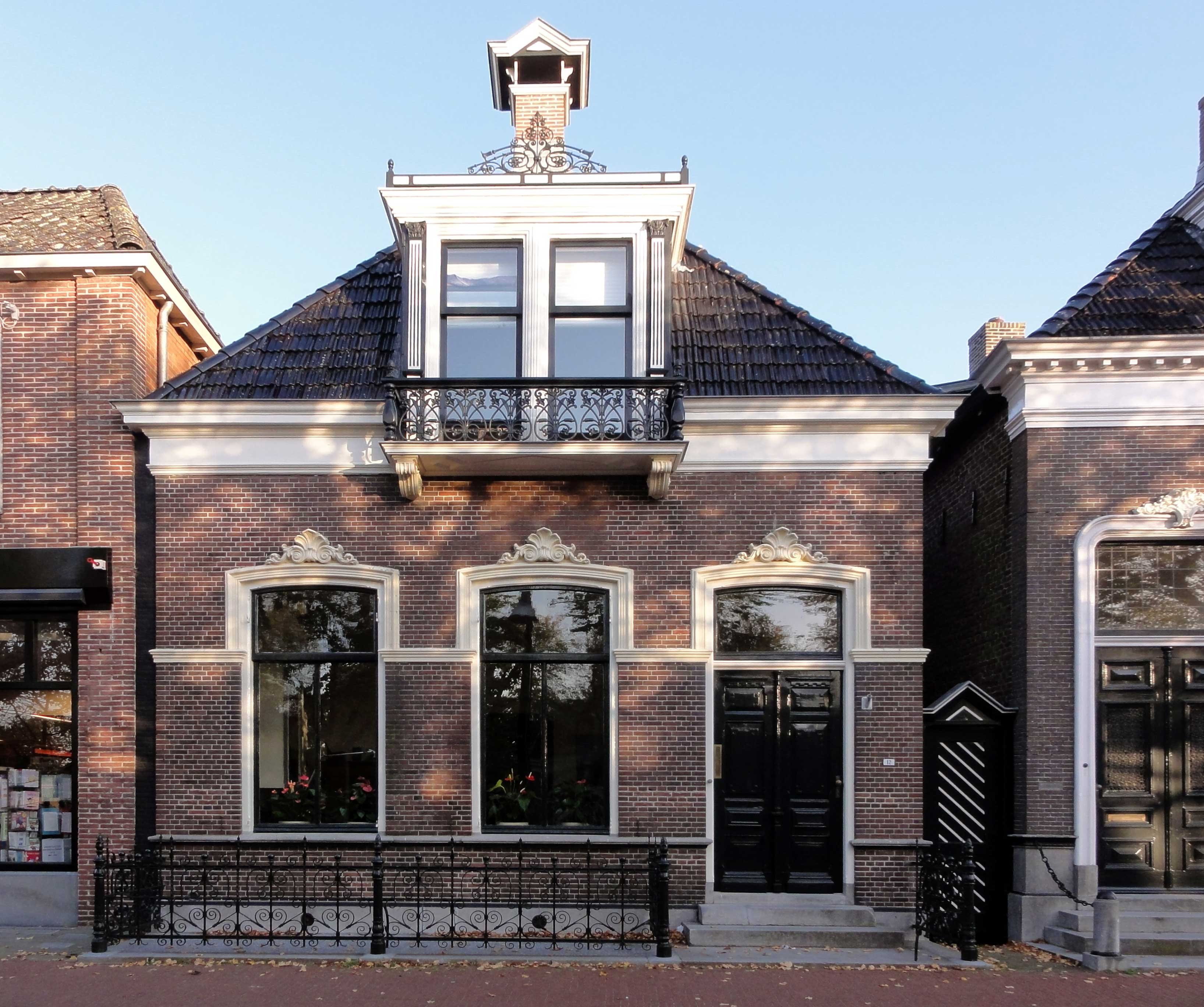 Van Swinderenstraat 12 Balk